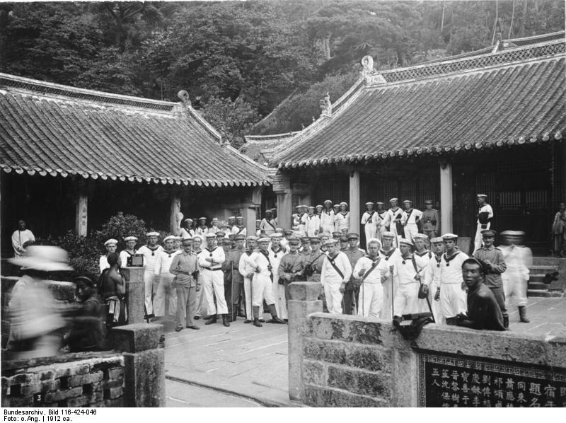 China, Tsingtau China, Tsingtau um 1912 [China, Tsingtau.- Gruppenbild von Matrosen mit Damen [Fotoalbum: Bilder aus China, von Ob.Matr.Artl. Quinten; Bem.: Originaltitel z.T. inkorrekt